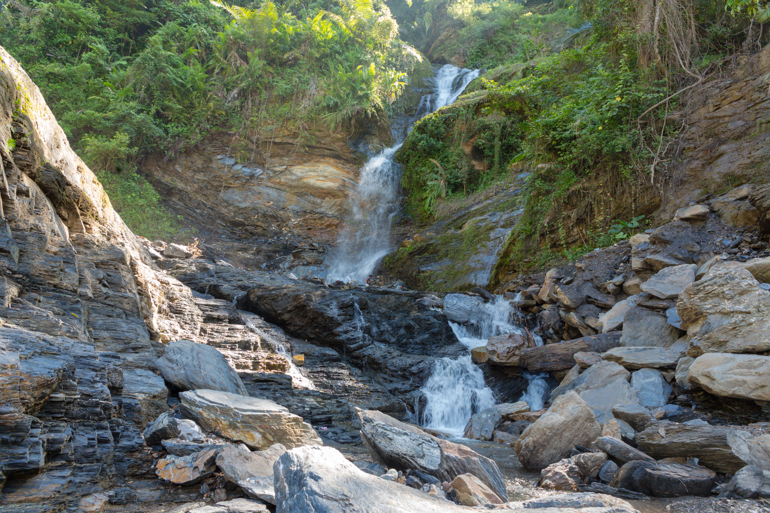 Cascatas de Berloi, Aileu, Timor-Leste